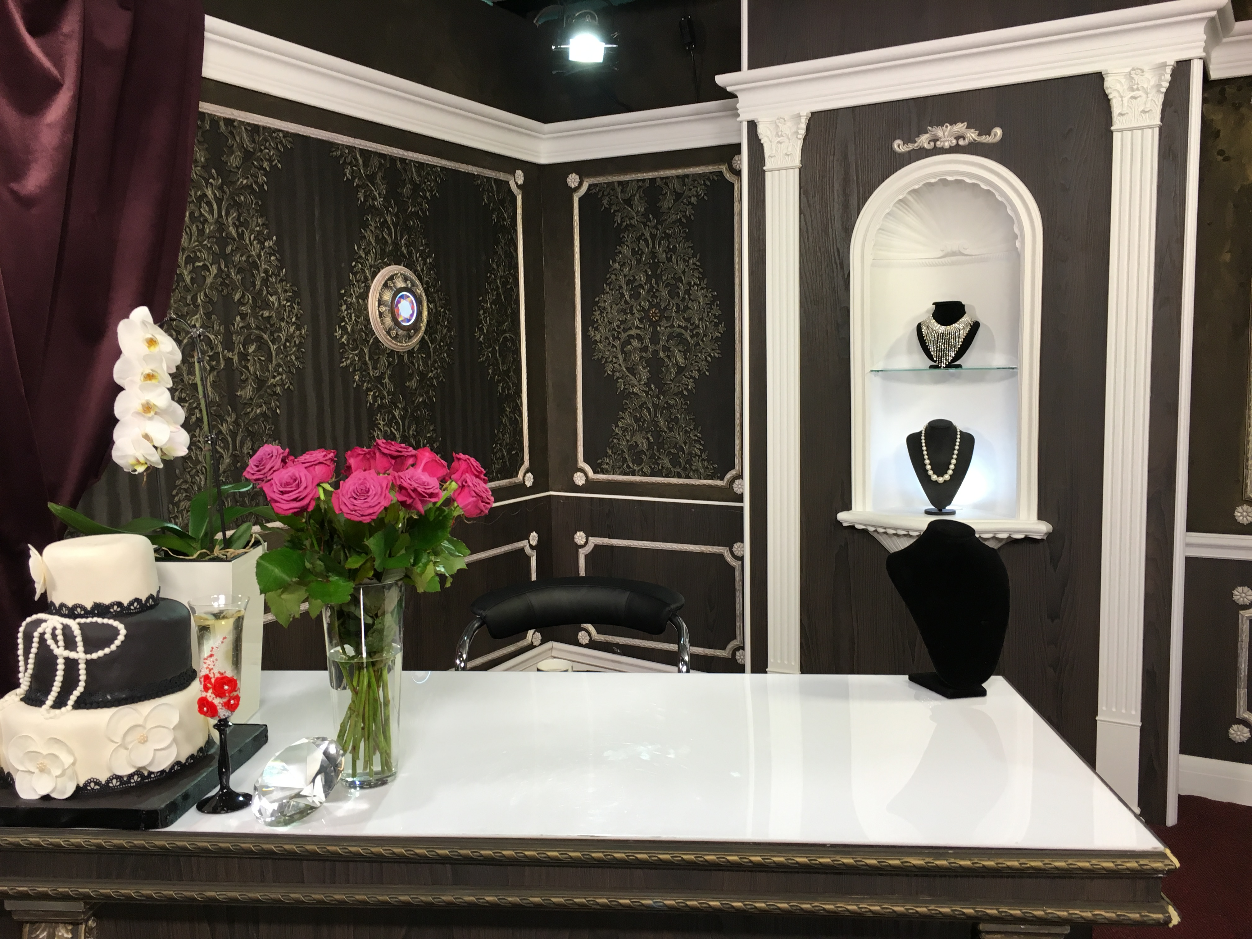 Студия ТЮСО,2015 год